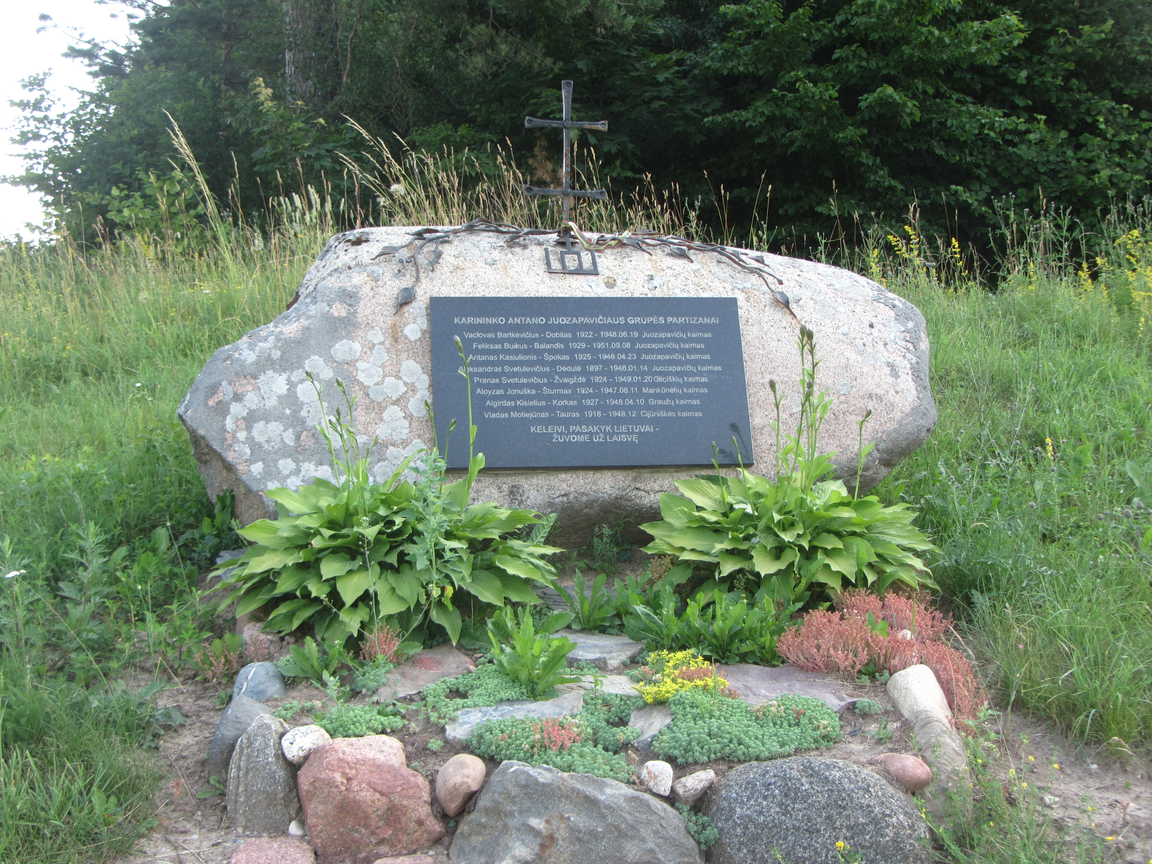 Noragėliai, Lithuania